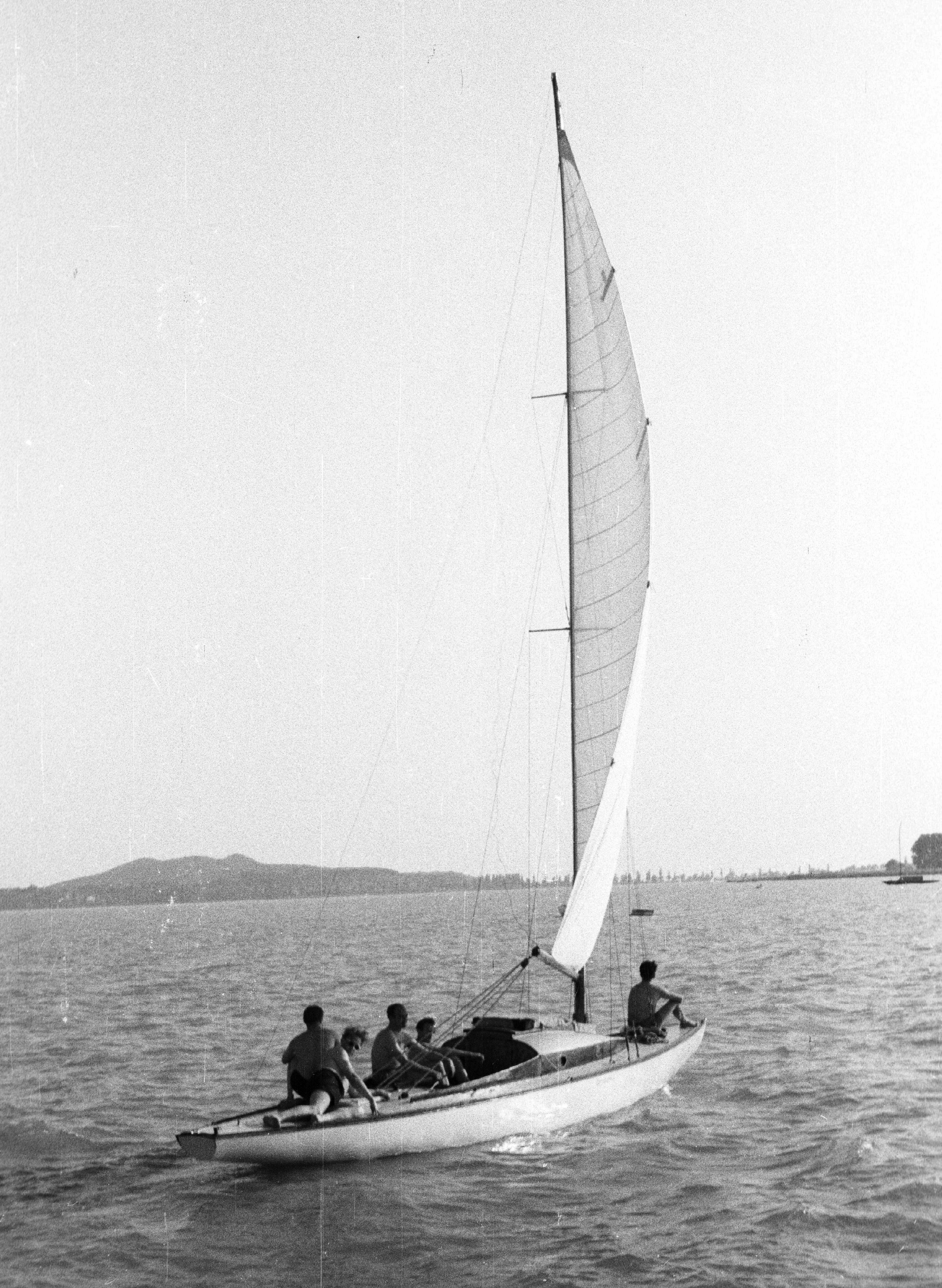 30-as cirkáló Füred térségében, a háttérben a Tihanyi félsziget és a Füredi öböl. Location: Hungary, Balatonfüred, Lake Balaton Tags: sailboat Title: 30-as cirkáló Füred térségében, a háttérben a Tihanyi félsziget és a Füredi öböl.